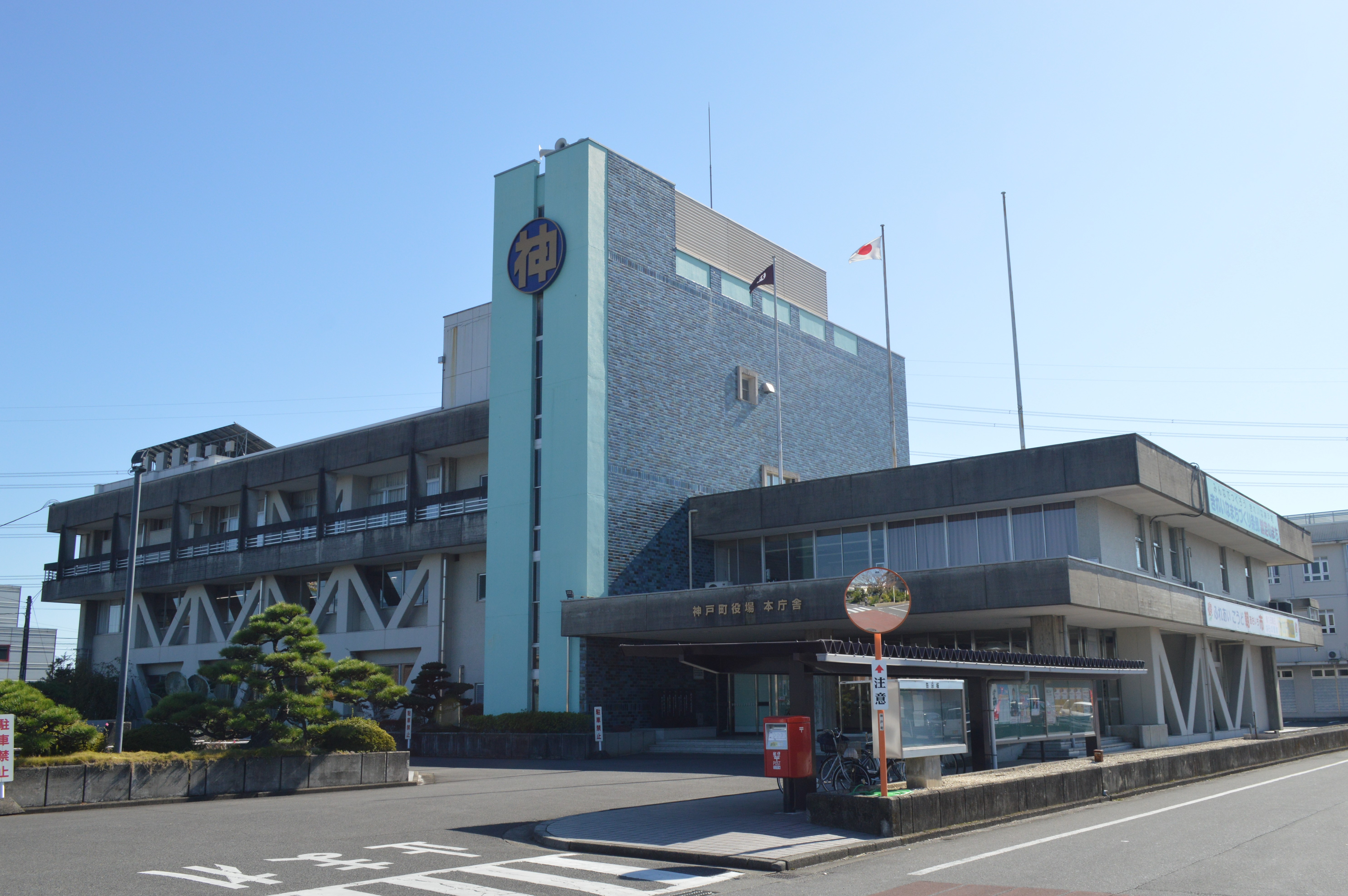 岐阜県安八郡神戸町にある神戸町役場。